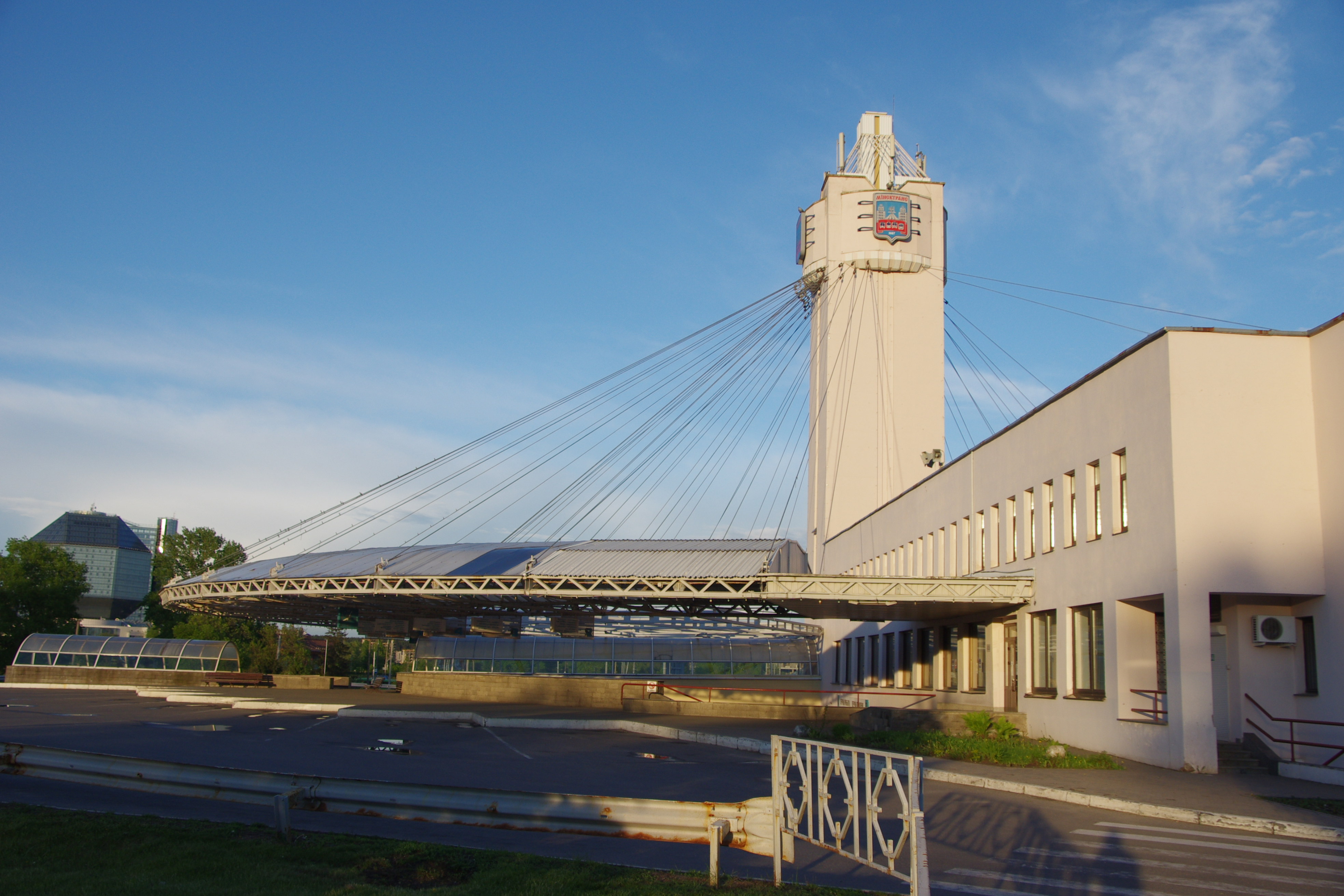 Minsk, Belarus